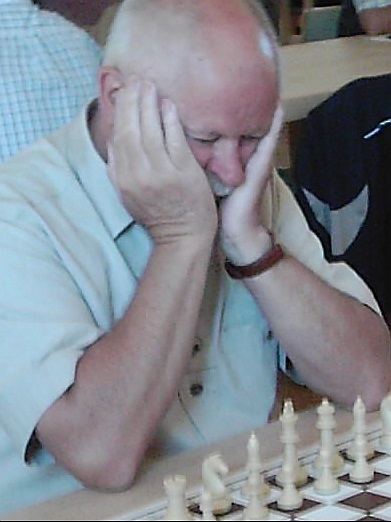 Rainer Oechslein, Runde 2 der Bayerischen Seniorenschachmeisterschaft 2009 in Bergen (Chiemgau).